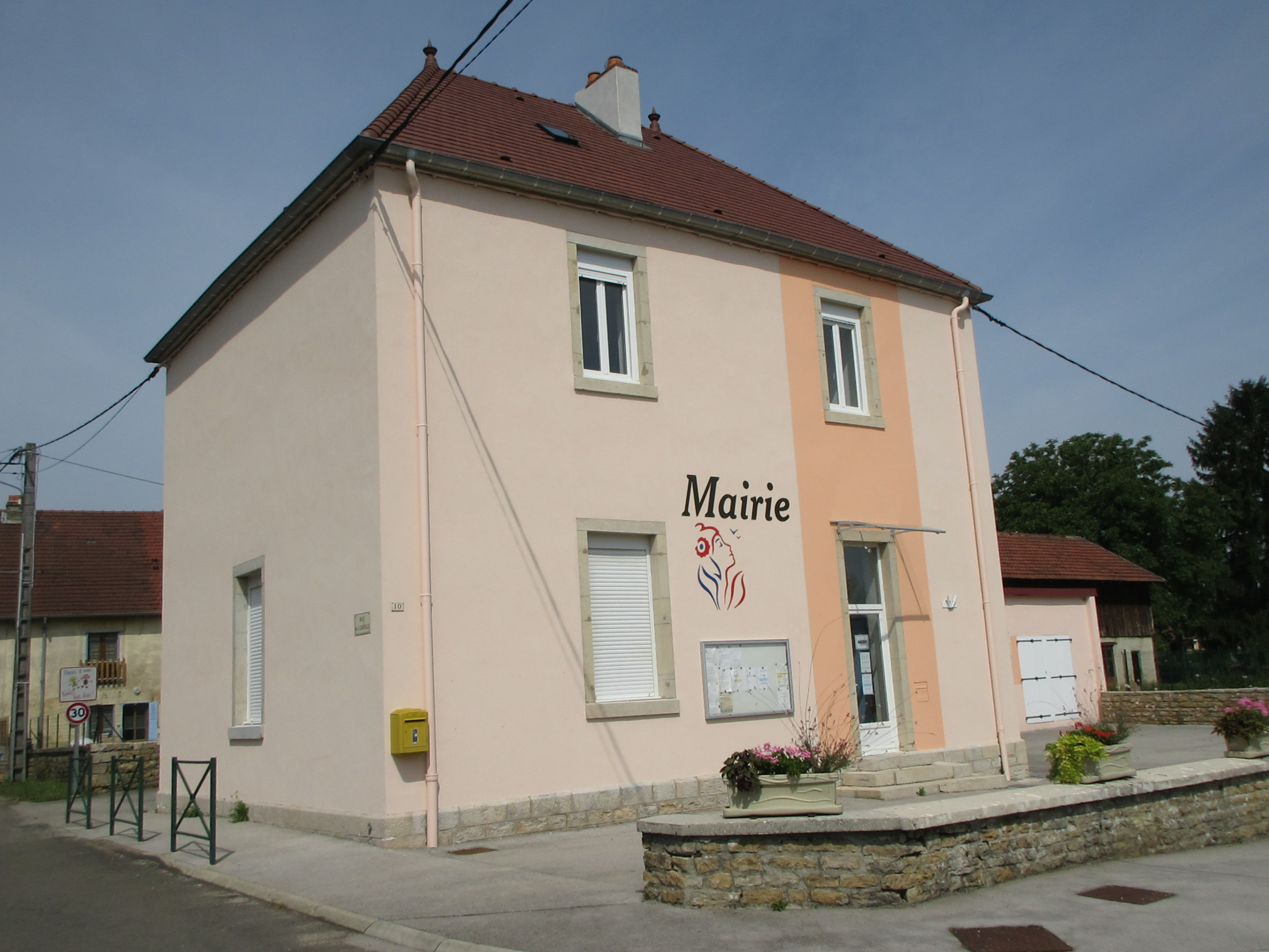 Mairie de Geruge.